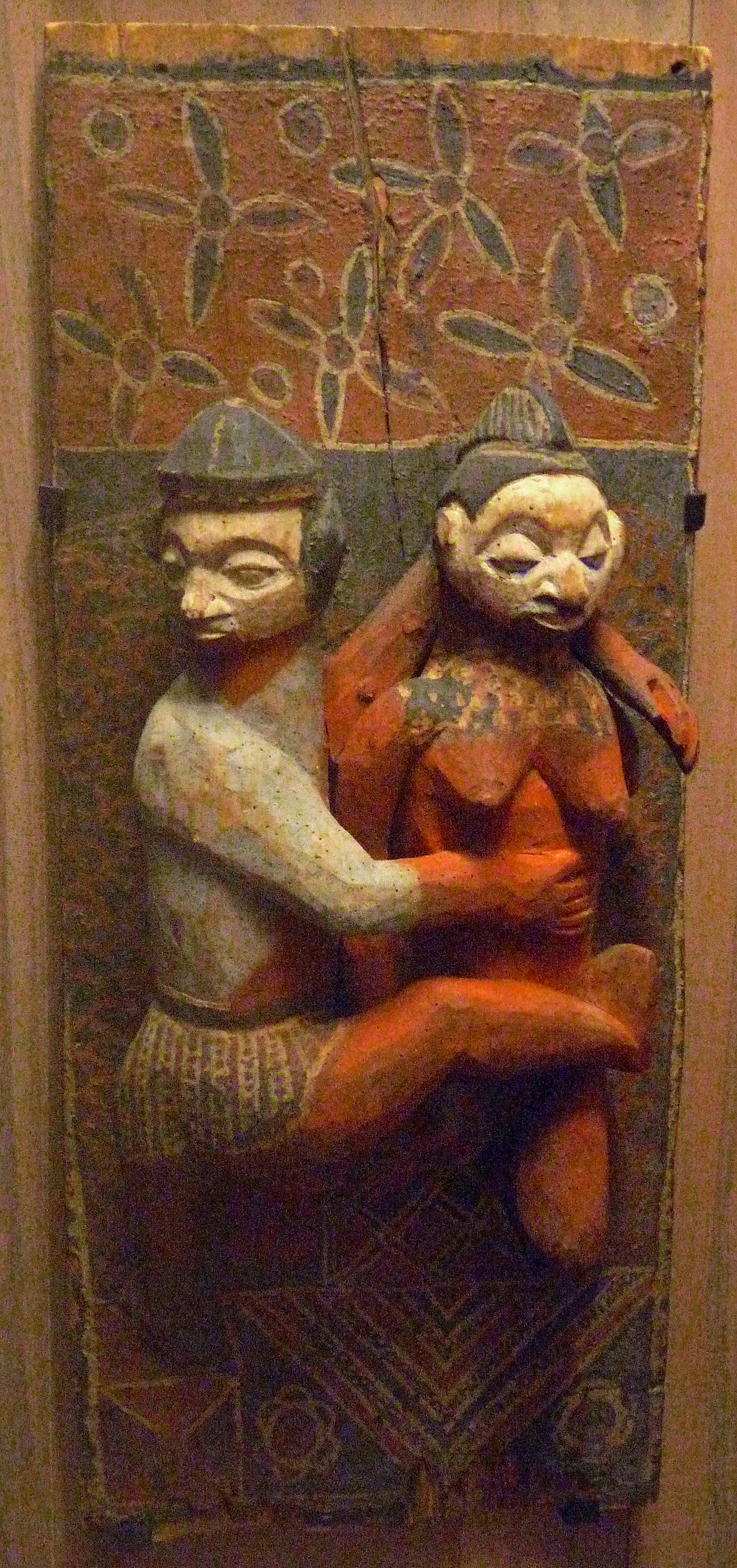 Panneaux de case d'initiation, population Nkanu, République démocratique du Congo. 19e siècle, bois et pigments. Musée du quai Branly.